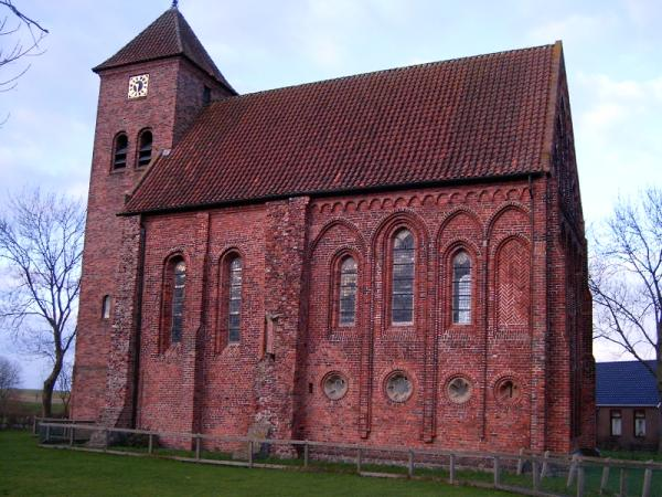 Kerk van Termunten